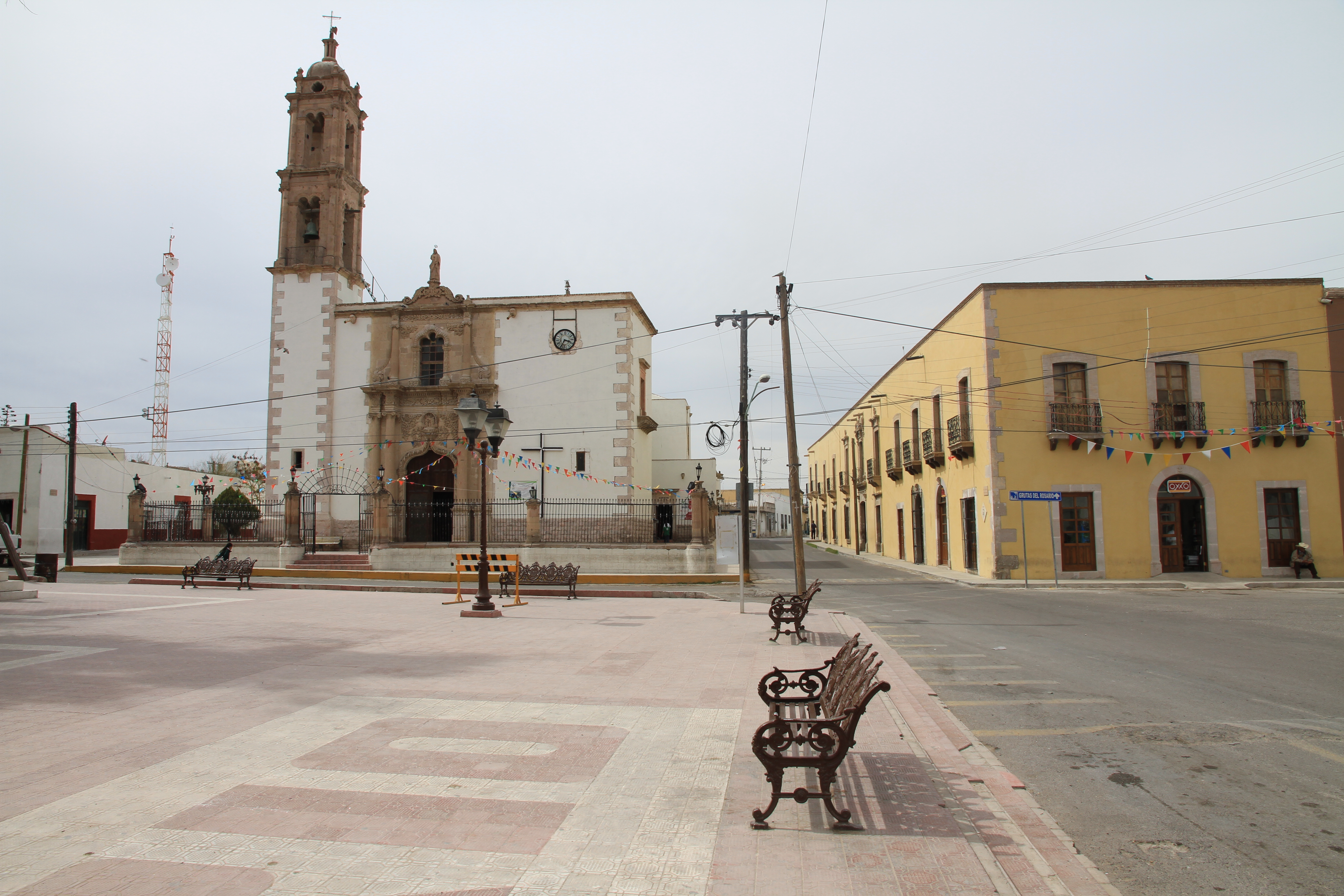 Mapimí Durango